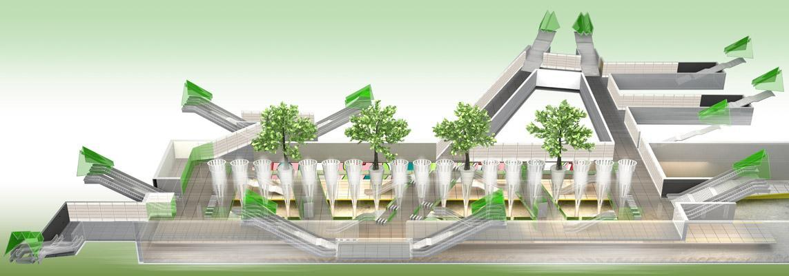 Wielobranżowy Projekt Koncepcyjny centralnego odcinka II lini metra w Warszawie